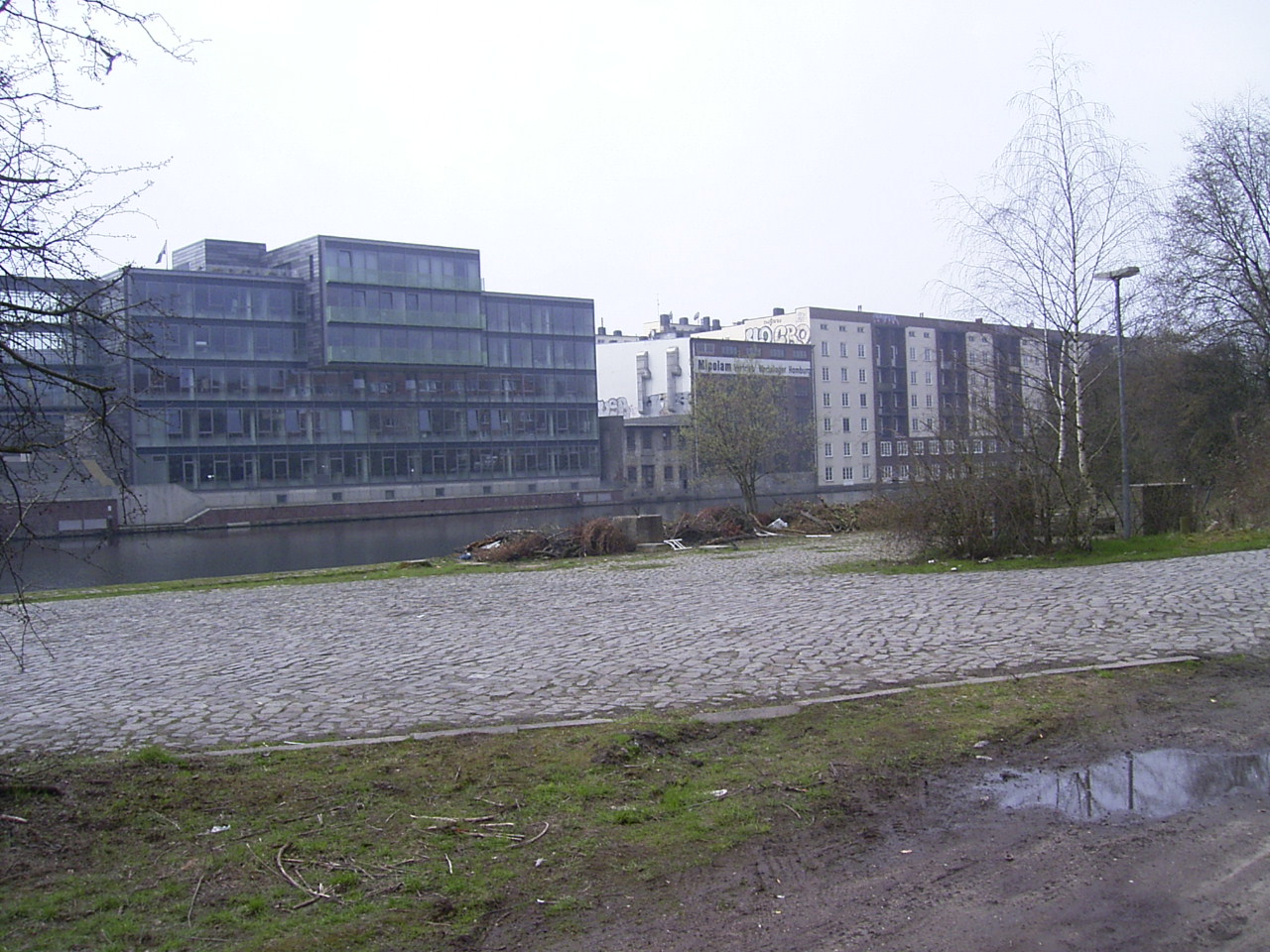 Die Osterbek als Industriekanal am ehemaligen Löschplatz Lämmersieth in Barmbek-Nord